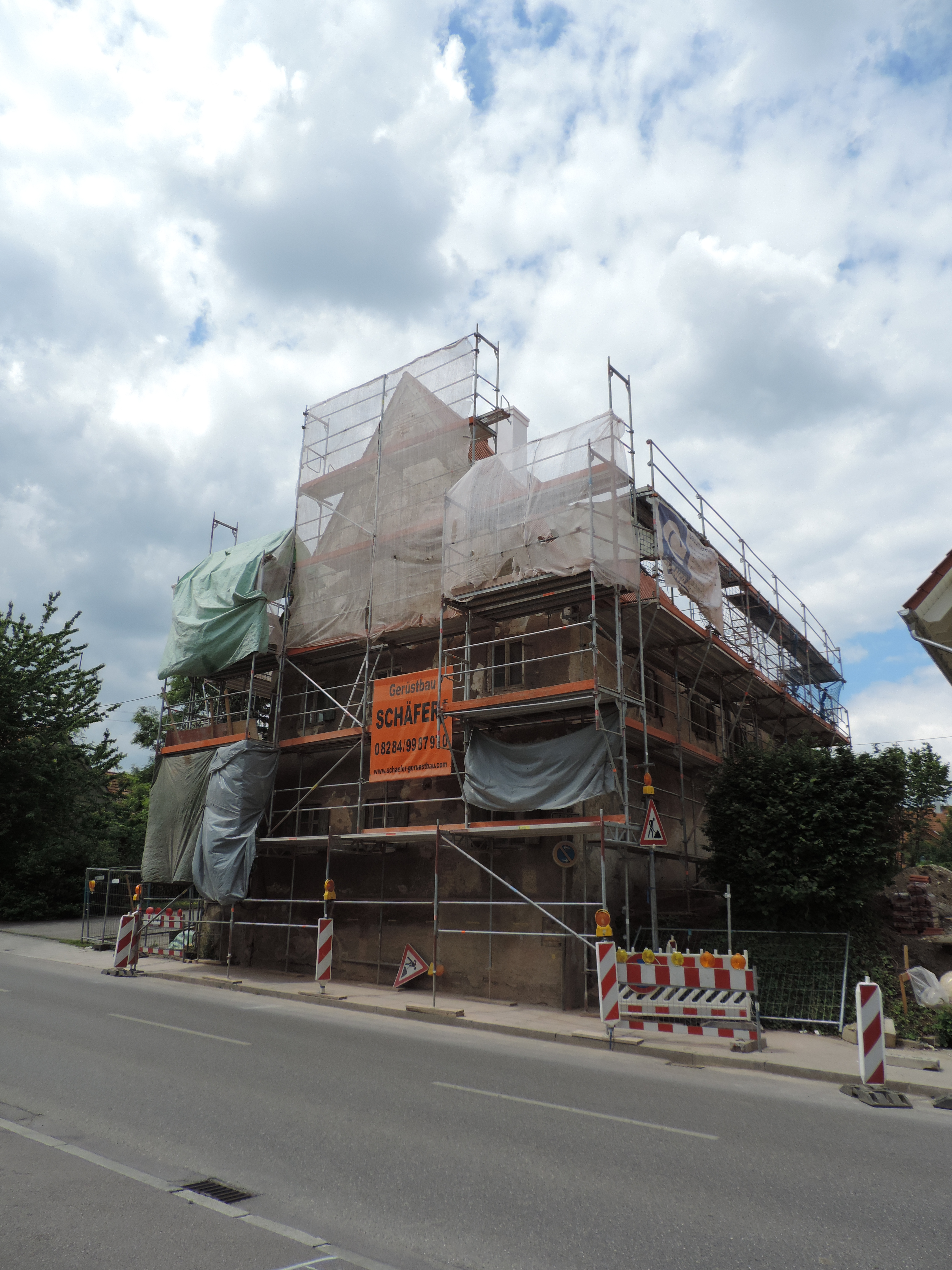 Giebelhaus